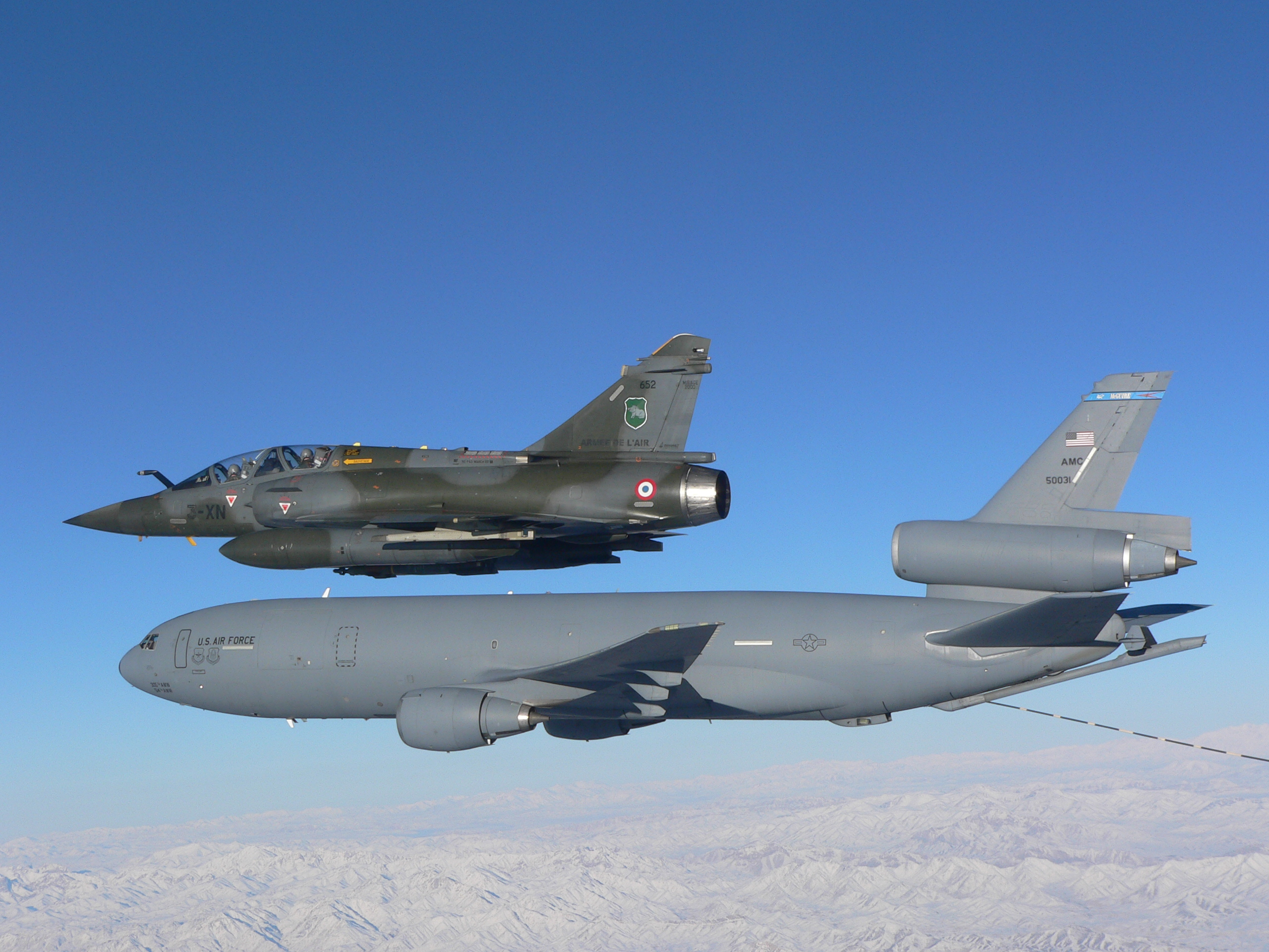 Mirage et tanker en vol